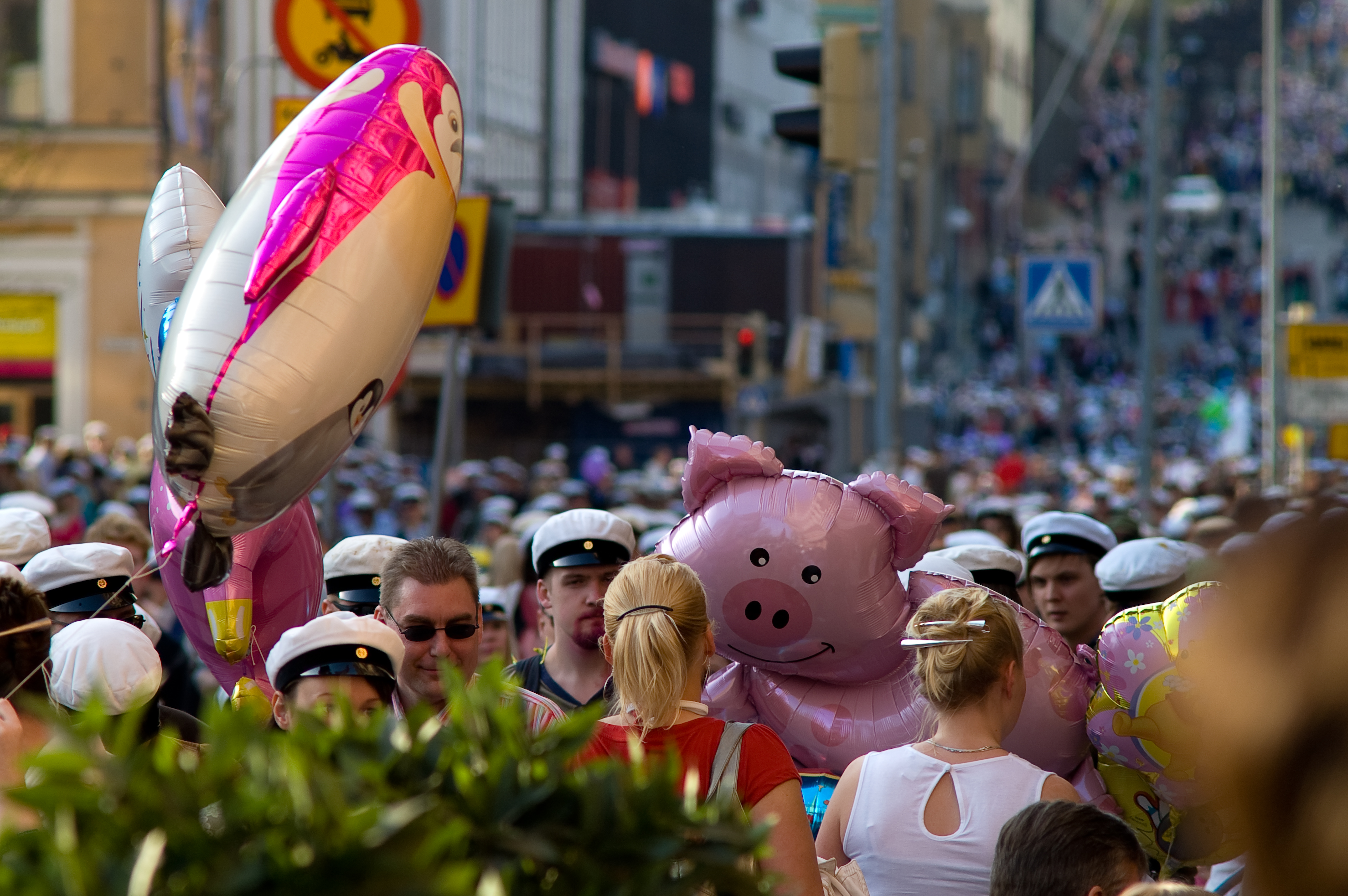 Vappu in 2008 at Turku